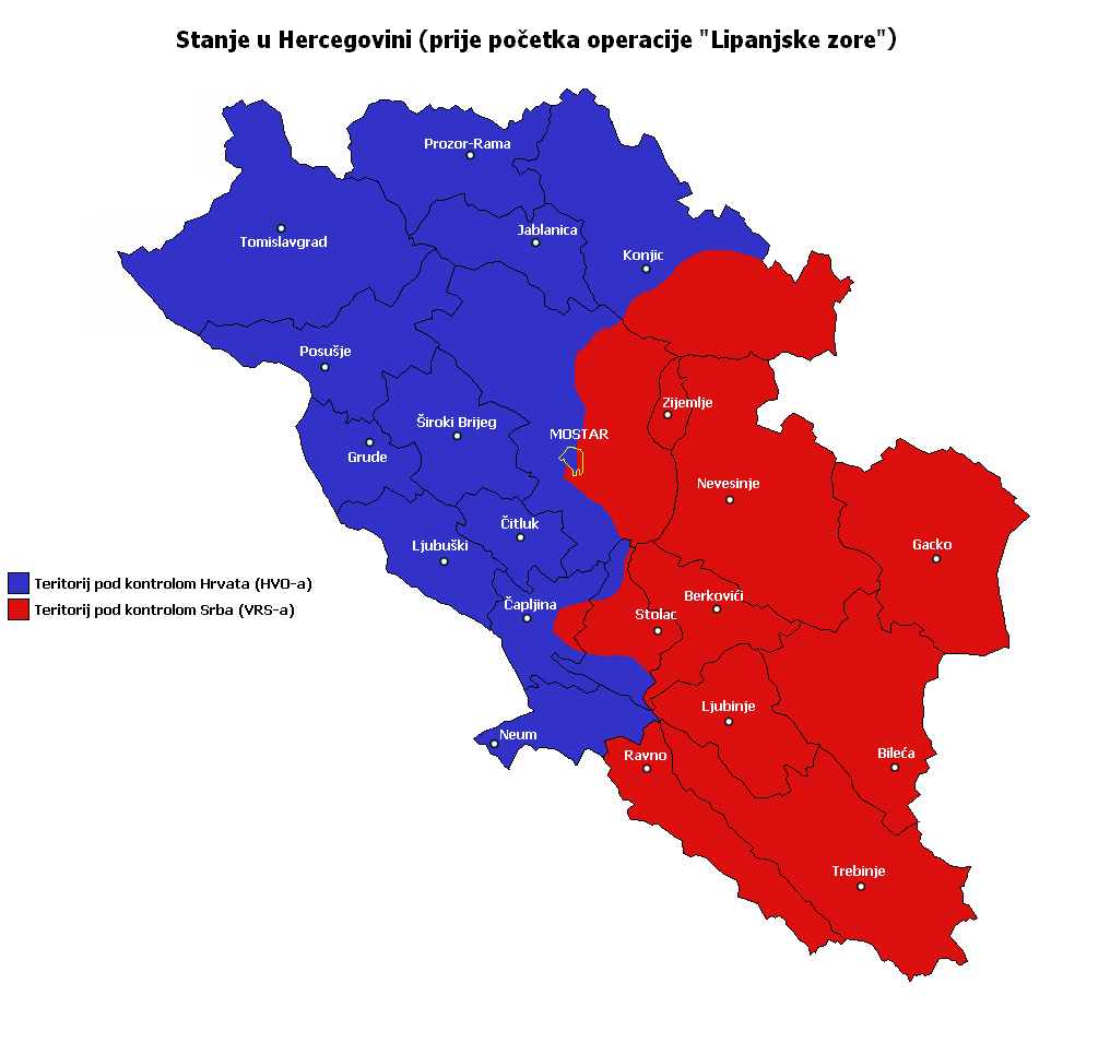 Hercegovina prije operacije "Lipanjske zore"